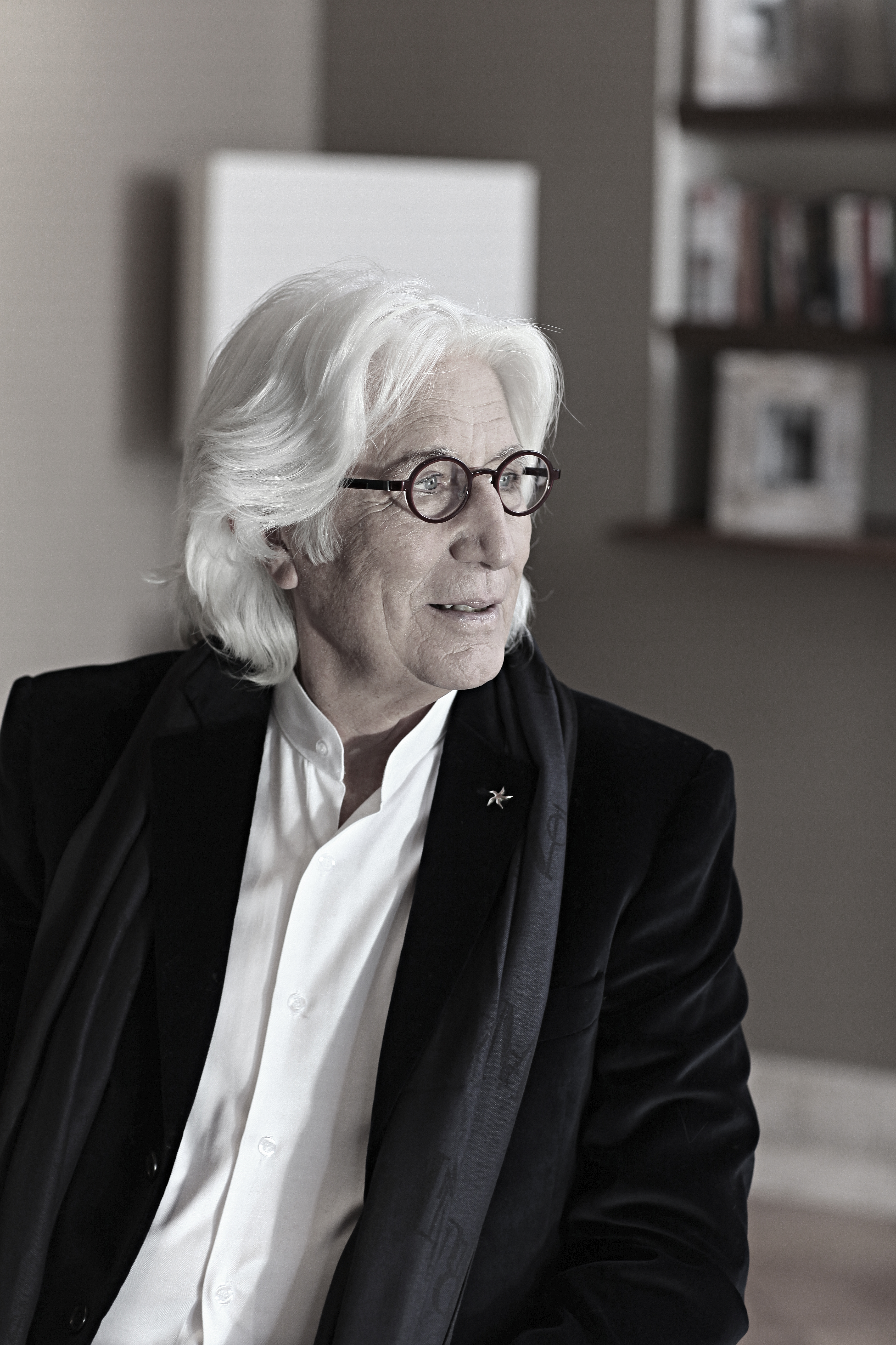 Miguel Fluxá Roselló. Presidente del Grupo IBEROSTAR